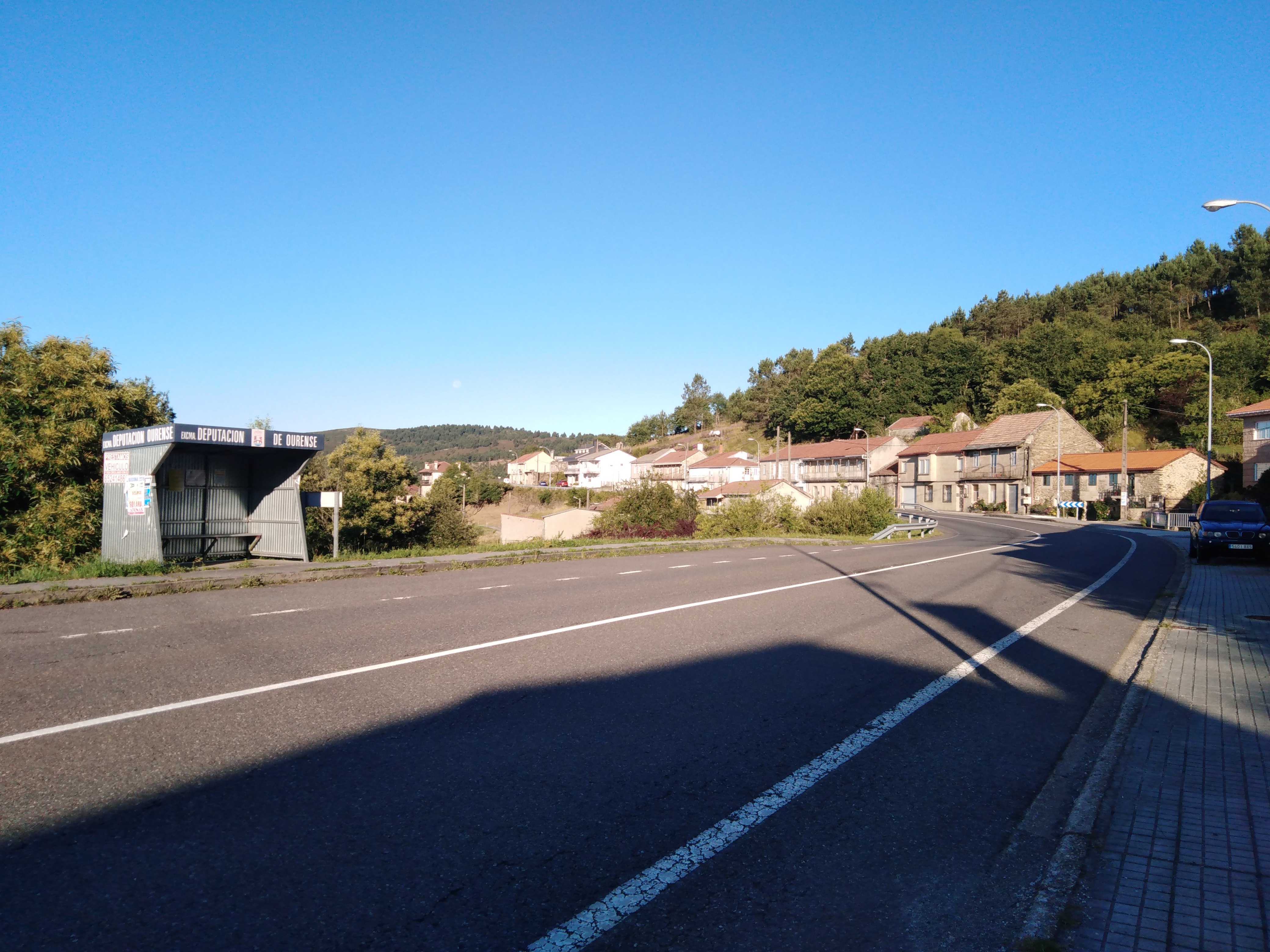 Estrada N-541 ao seu paso pola Ermida (Lebozán, Beariz)